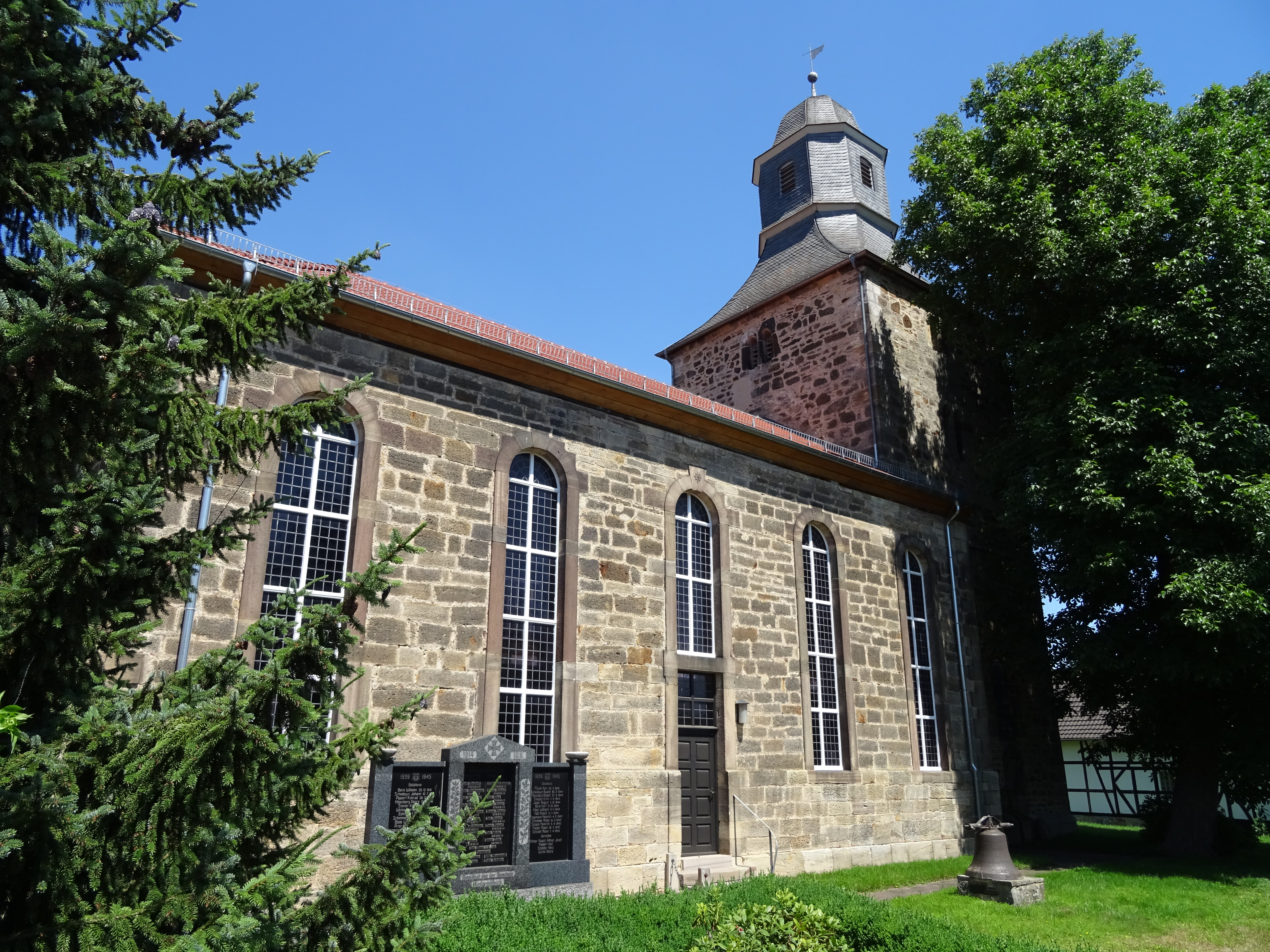 Außenansicht